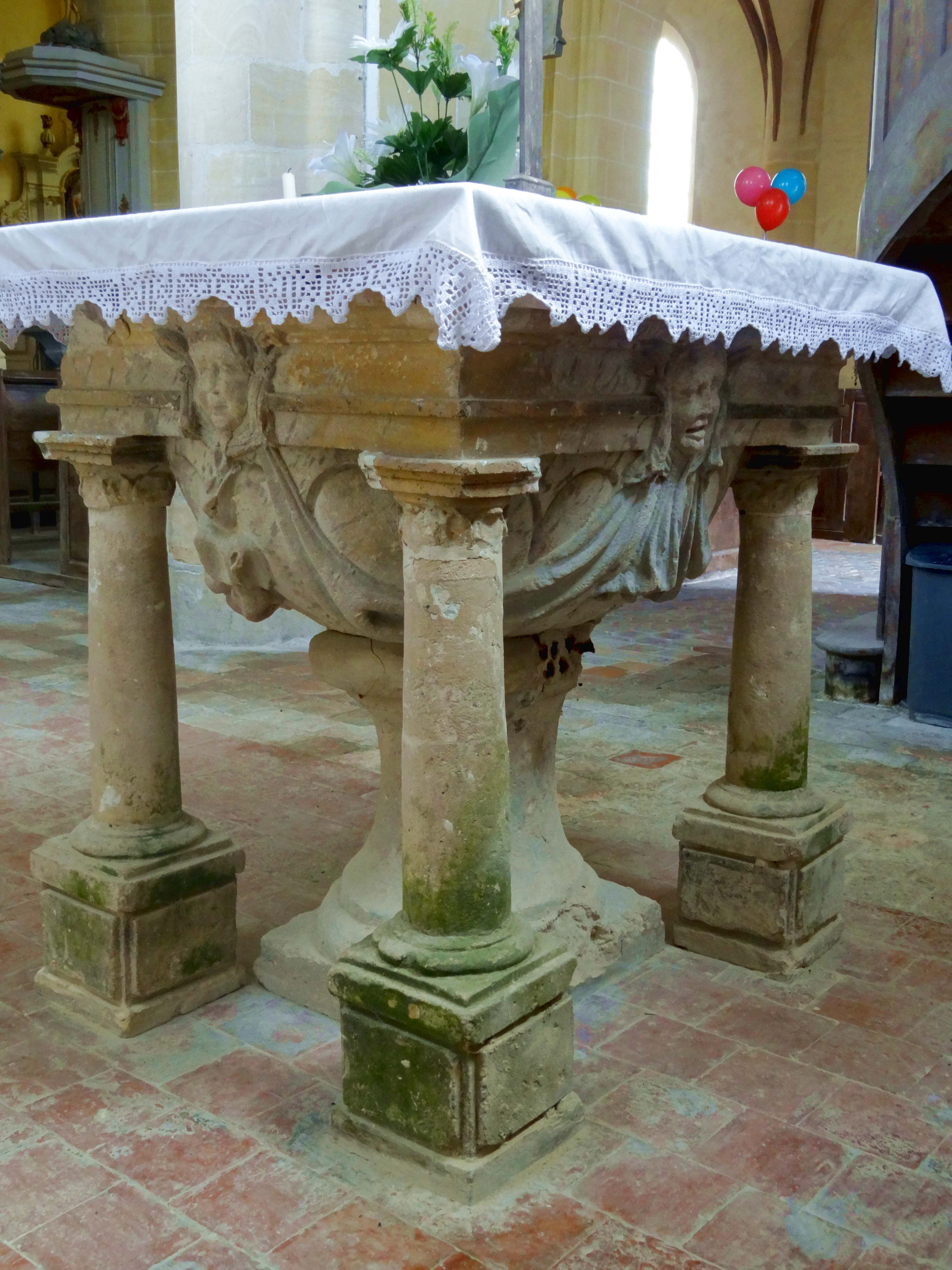 Mobilier de l'église - voir titre.